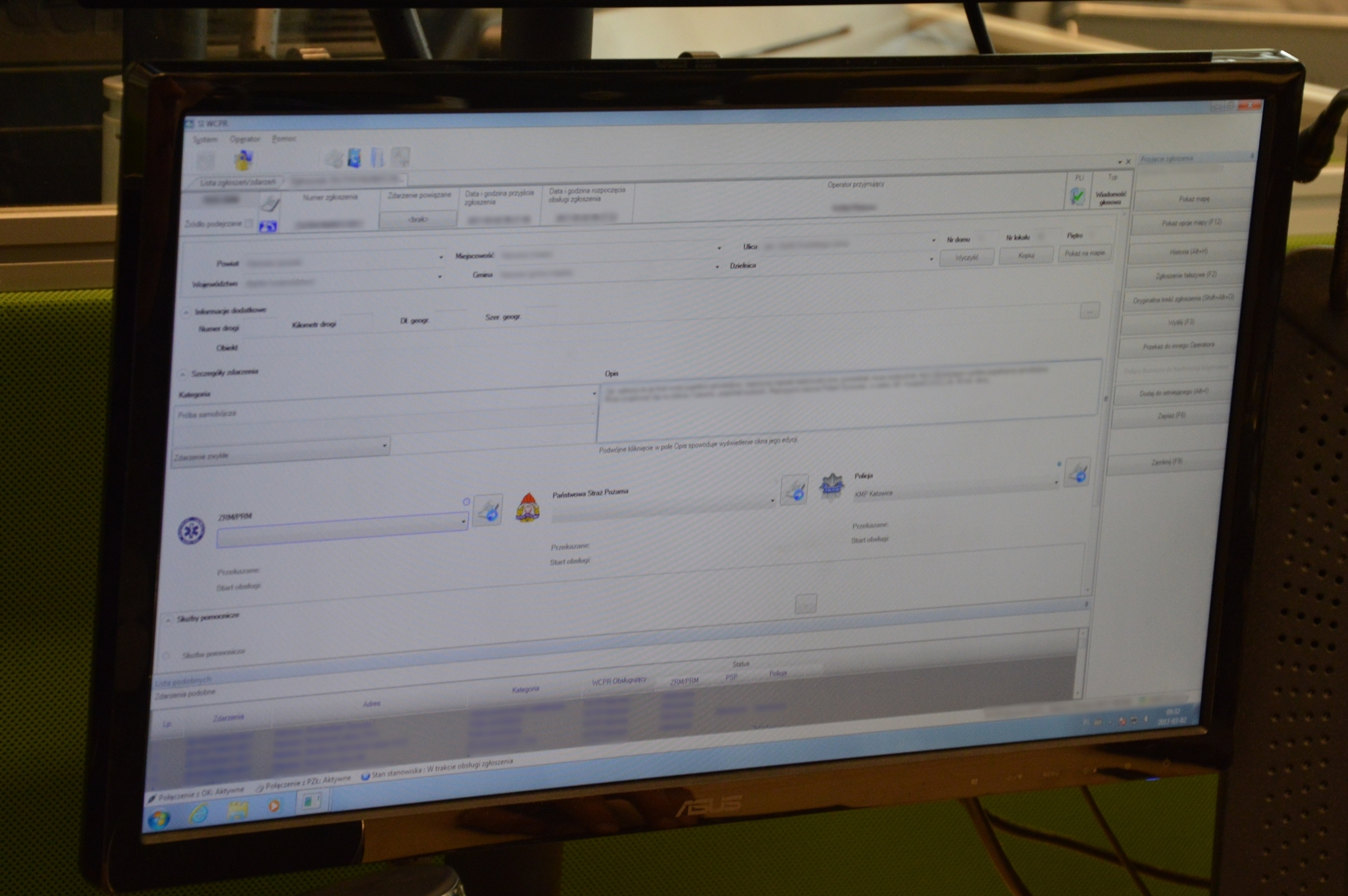 Centrum Powiadamiania Ratunkowego w Katowicach